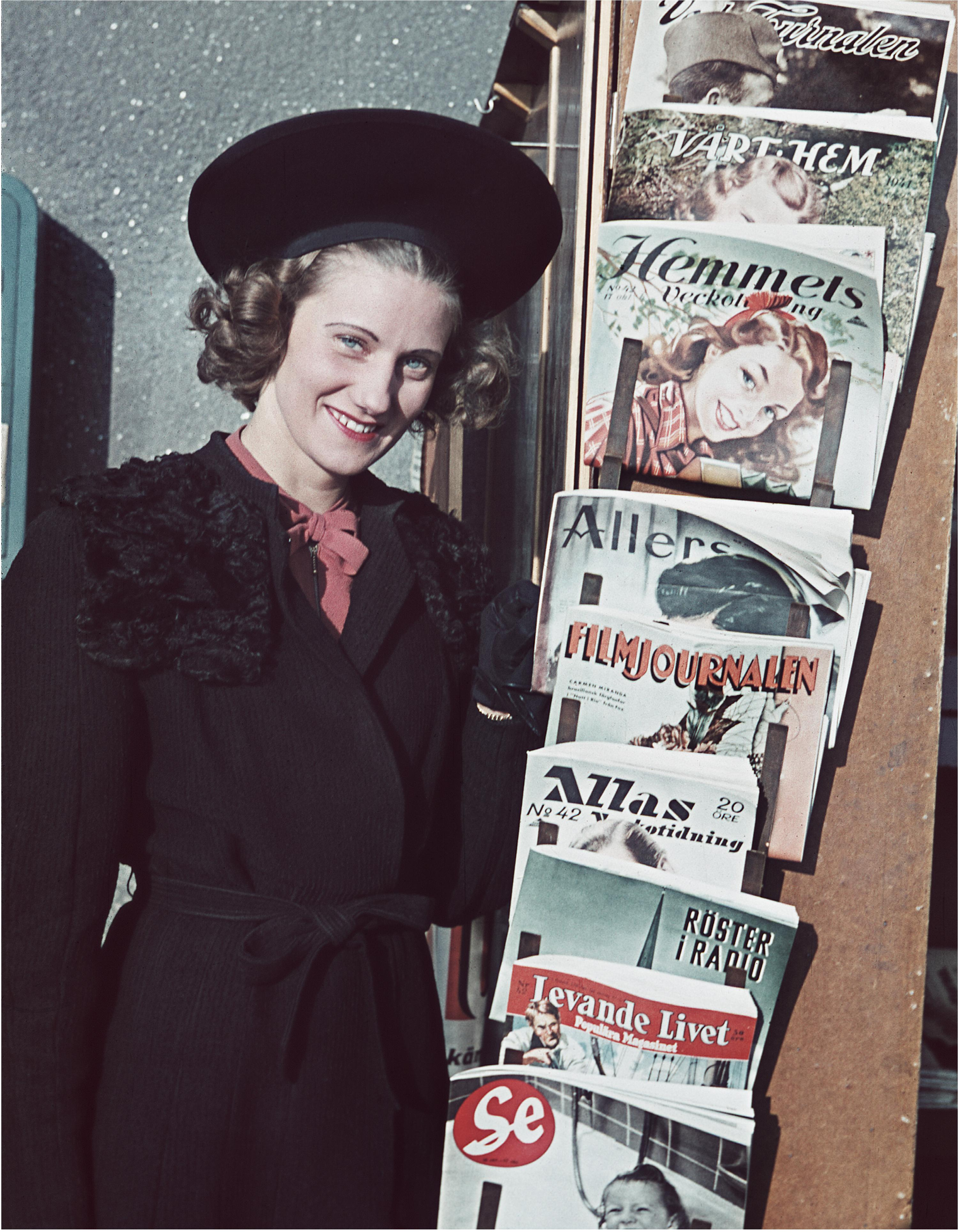 Leende kvinna i svart kappa med pälskrage och hatt bredvid tidningsställ med veckotidningar. Ämnesord: Kläder : Huvudbonad, Kvinna, Massmedia, Mode.